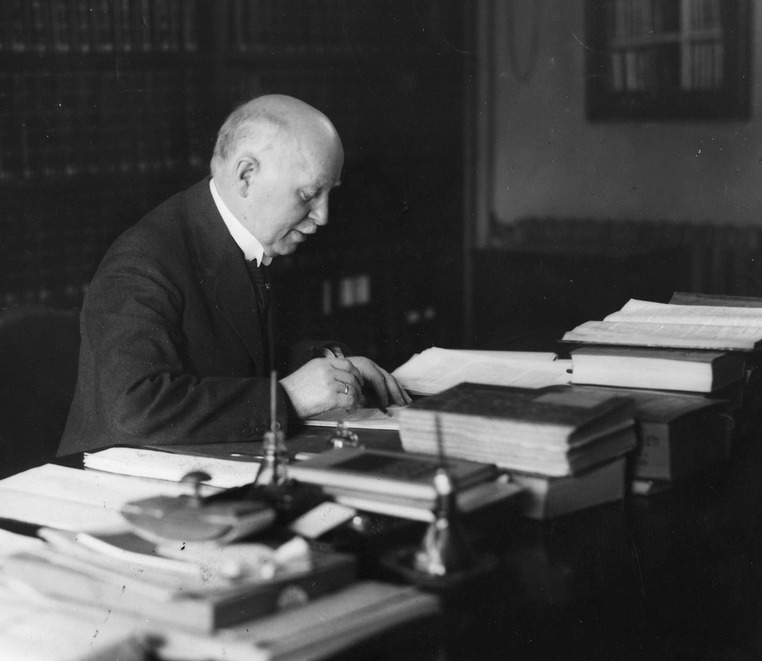 Stortingsarkivar Vilhelm Haffner, portrett, mann, stortingsarkivar, sittende halvfigur ved skrivebord.